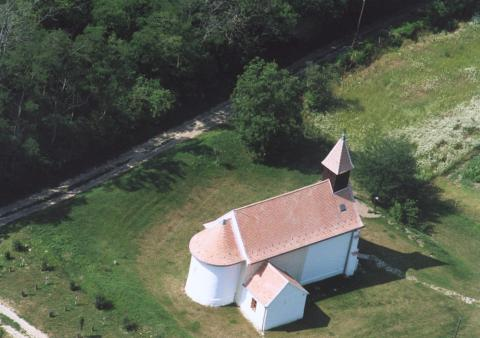 gyugy_ temple, Hungary, aerialphotography. Urunk mennybemenetele római katolikus templom